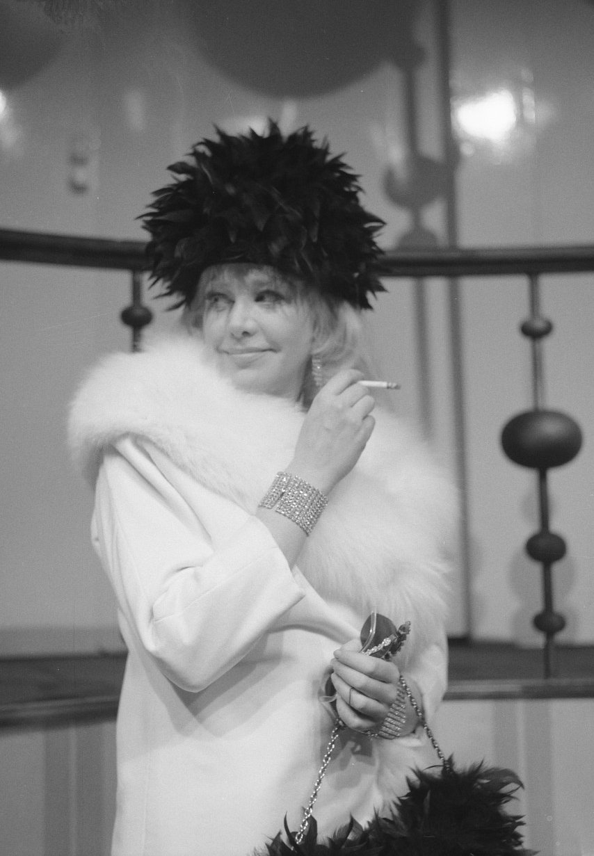 Hildegard Knef treedt op "Nicht von gestern" in de Philips Schouwburg te Eindhoven, Hildegard Knef zoals zij in het stuk te zien is